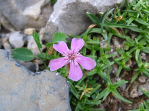 Visión de la planta con sus hojas